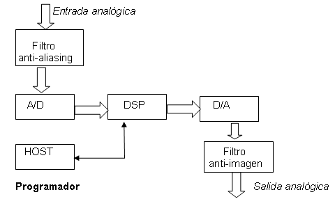 Imagen creada por el usuario Murphy sujeta a las condiciones de la licencia GFDL